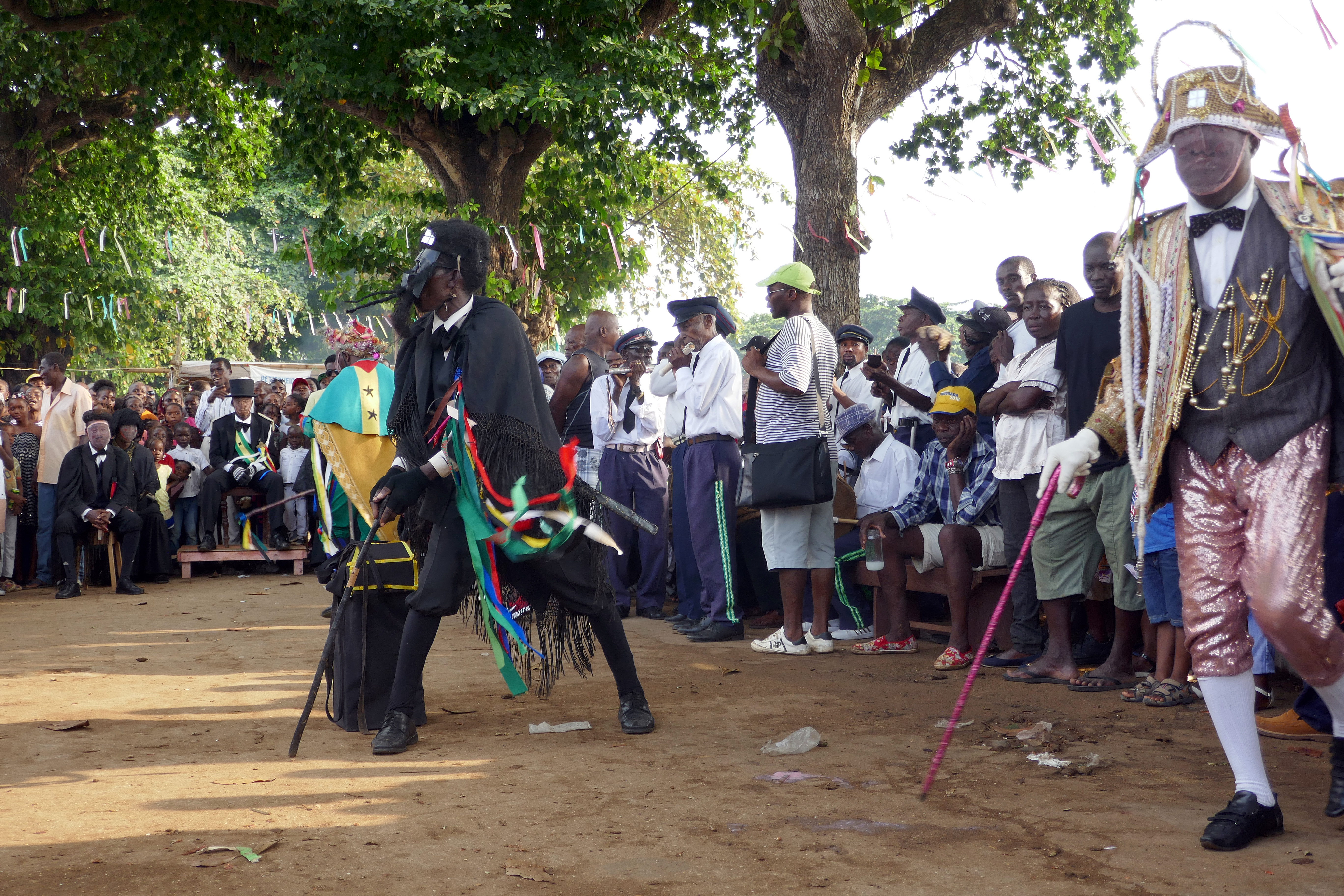 Tchiloli représenté devant l'église São Pedrão de São Tomé à l'occasion de la fête patronale. Le tchiloli est une forme théâtrale, musicale et dansée créée au XVIe siècle, jouée par des pêcheurs et des paysans. Traditionnellement elle met en scène la seule pièce du répertoire, La tragédie du marquis de Mantoue et de l'empereur Charlemagne". This is an image with the theme "Play" from: Sao Tome and Principe